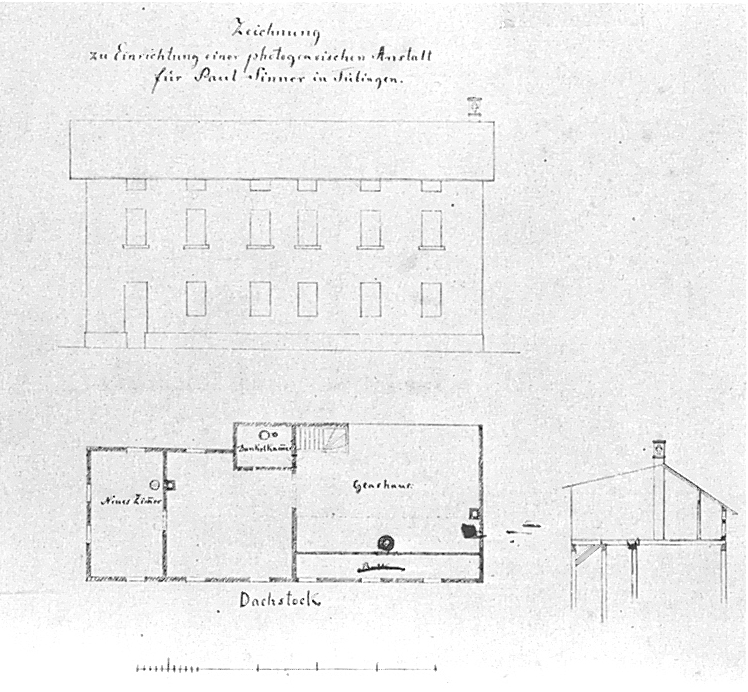 Bauplan für das Wohn- und Atelierhaus Gartenstraße 7 (Bauordnungsamt Tübingen, Akten Gartenstr. 7, Bauschau Blatt 775)